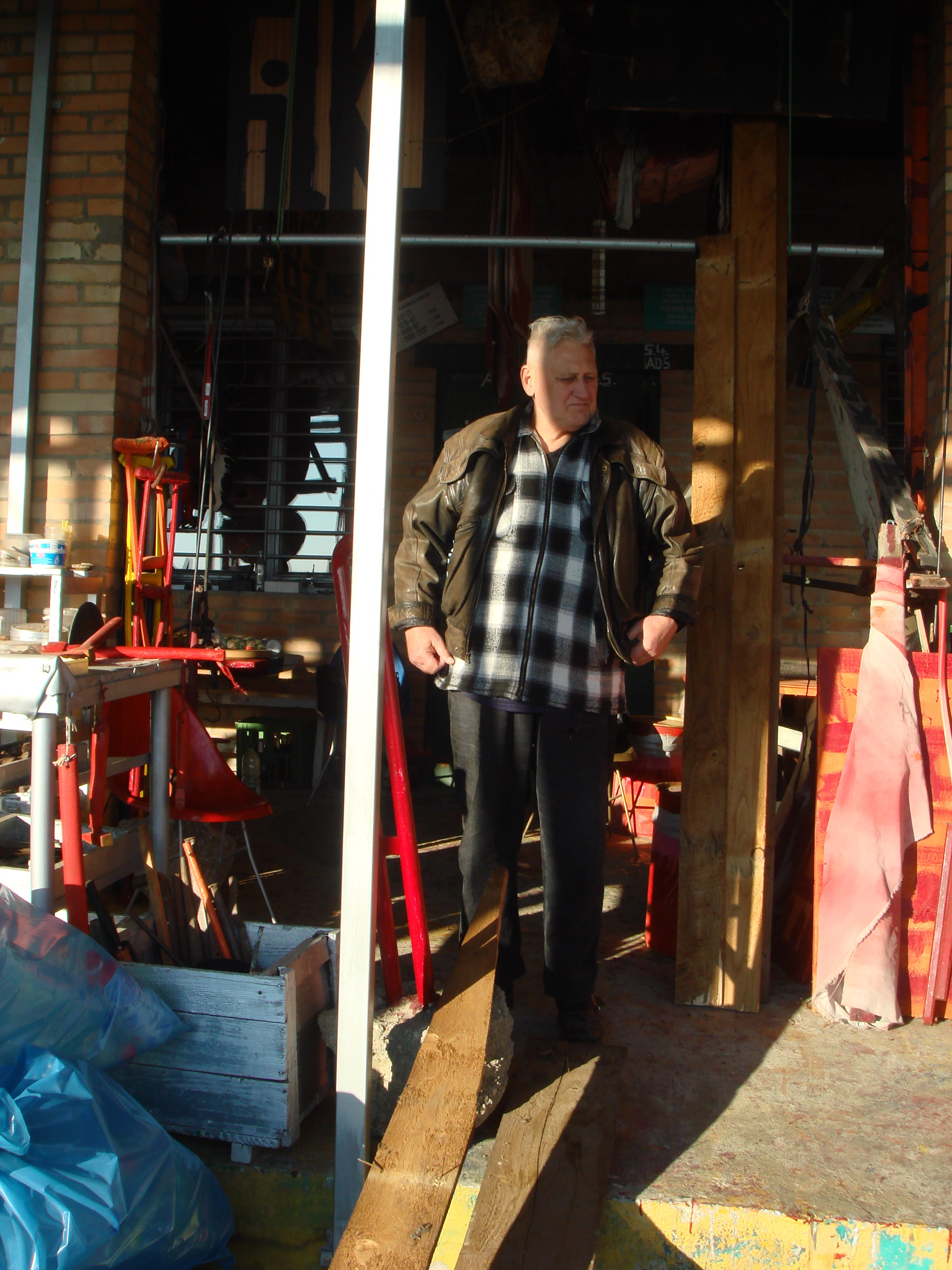 Stano Filko ve svém ateliéru v Bratislavě na Snežienkové ulici